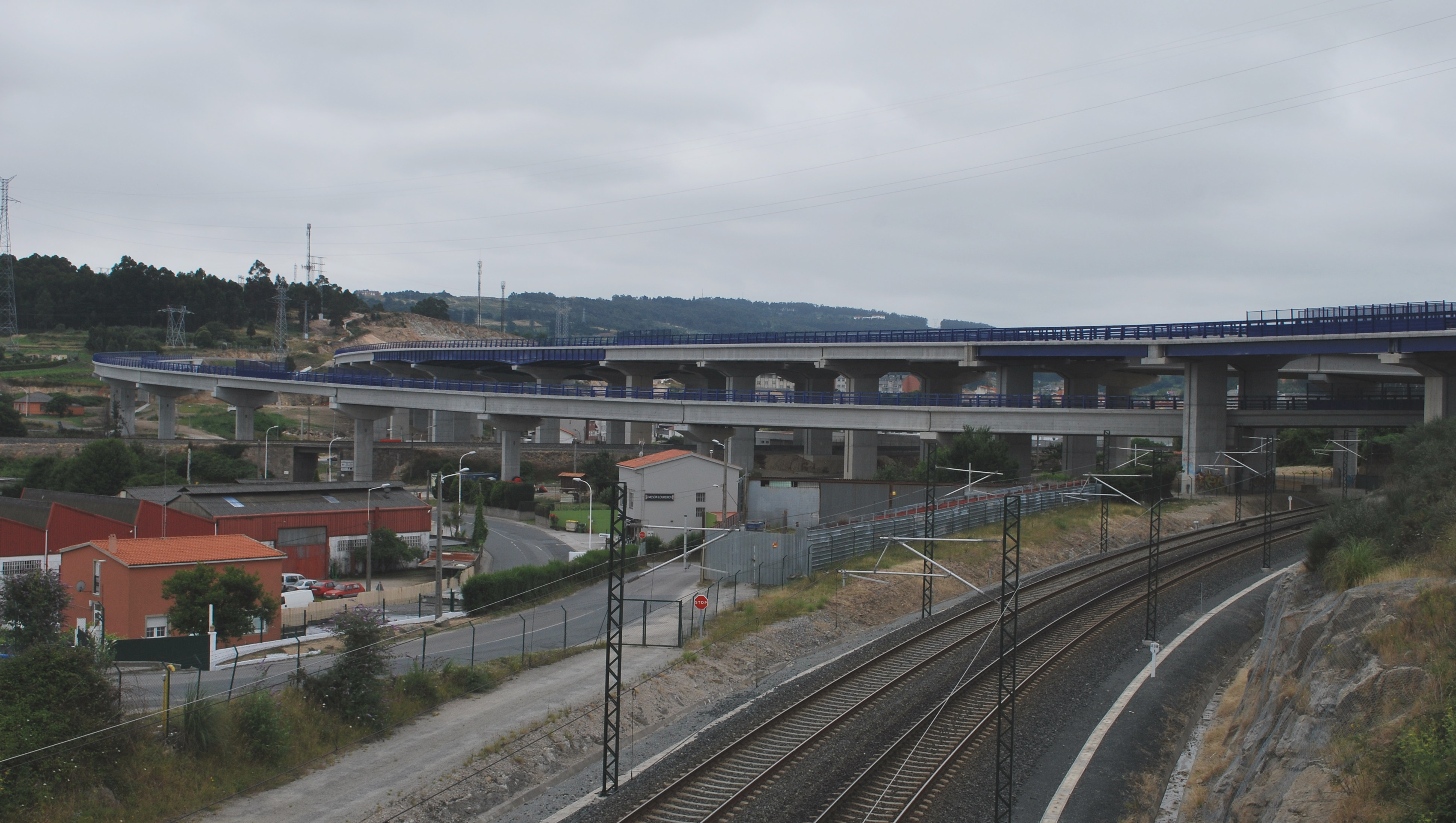 vista dos viadutos da AC 14 en Pocomaco, A Coruña. Galiza Spain